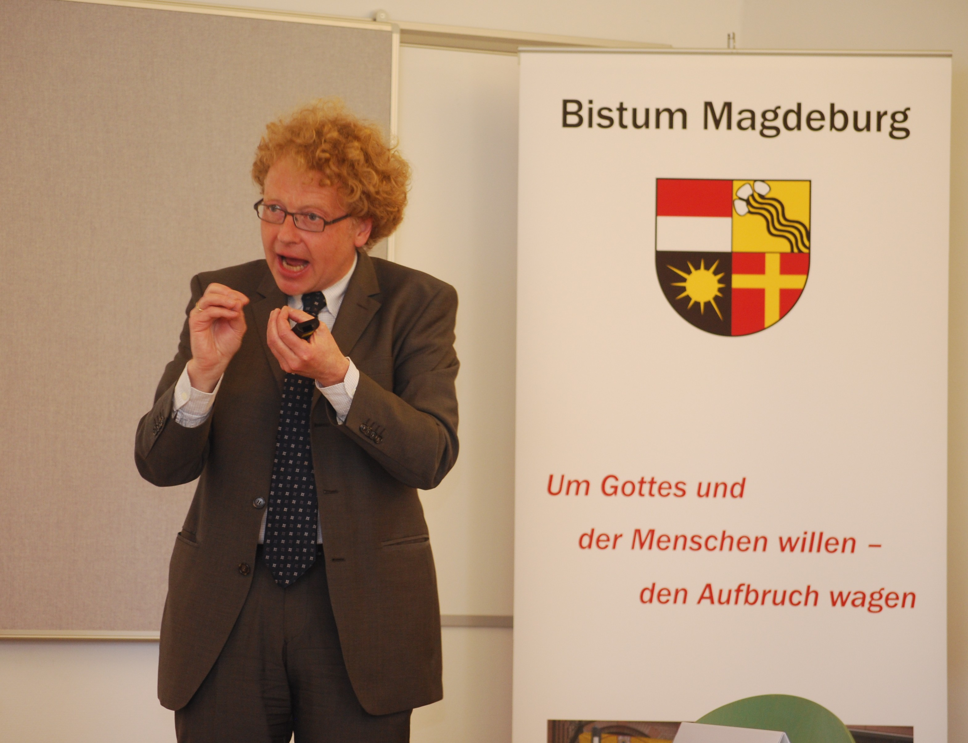 Professor Andreas Lob-Hüdepohl bei der Frühjahrsvollversammlung des Katholikenrates des Bistums Magdeburg am 25. April 2009